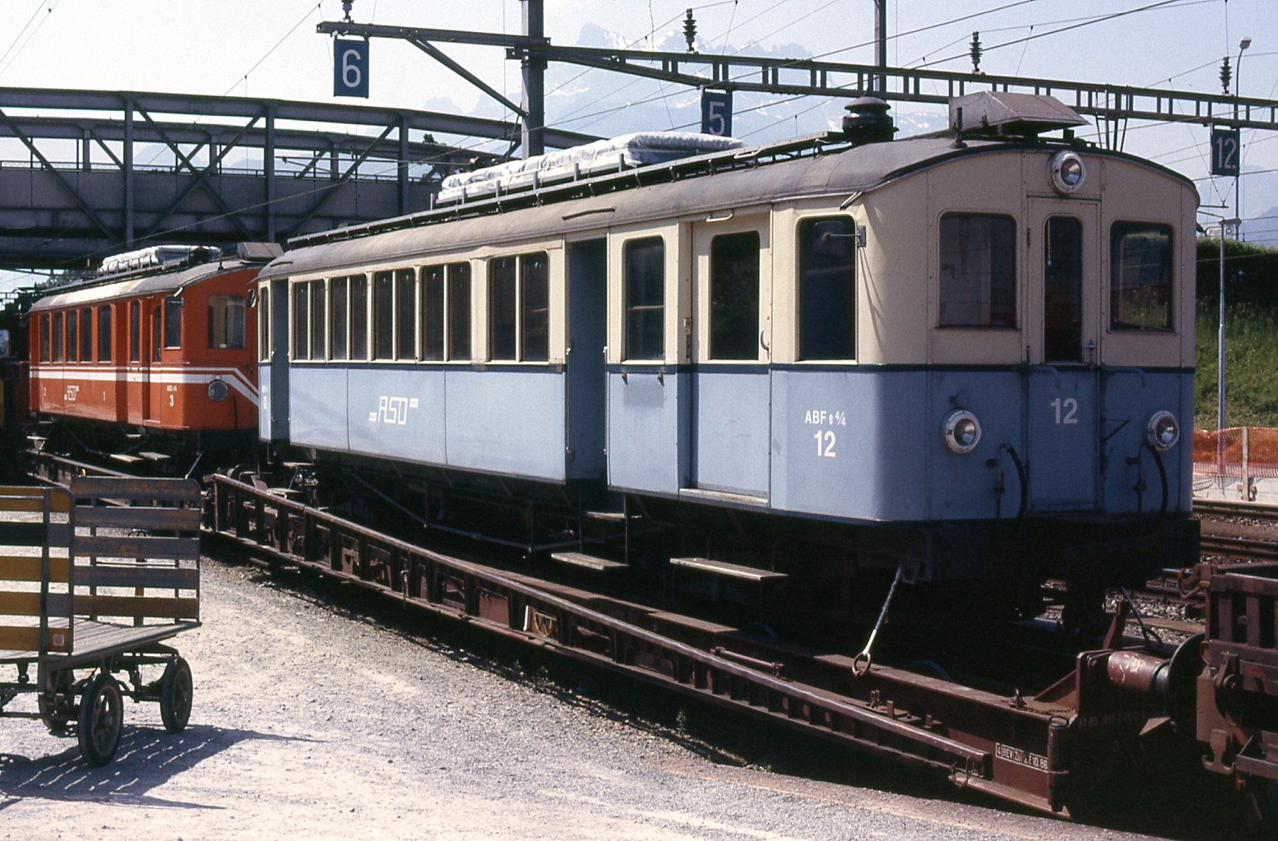 Photos. Trams aux Fils. Prise vers 1985 Départ de la motrice 12 et 3 pour le Chemin de Fer de la Mure Gare d'Aigle La ligne de l'Aigle-Sepey-Diablerets a été construite en 1914, à voie métrique, sa longueur et de 22 Kilomètres. Cette ligne est la plus menacée de disparition de Suisse, car depuis 1985, elle ne bénéficie plus de la couverture des déficits de la Confédération, elle existe encore grace au soutien financier du canton de Vaud et des communes riveraines. (Mais pour combien de temps encore ?) Autres photos